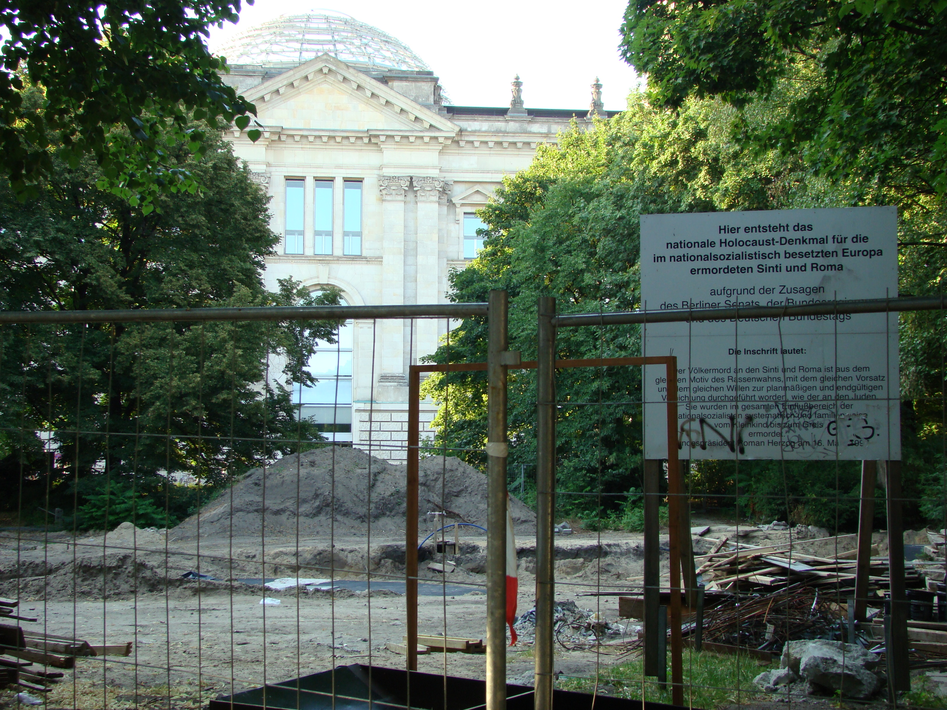 Denkmal für die im Nationalsozialismus ermordeten Sinti und Roma im Bau bzw. in Planung. Zustand am 1. Juli 2008